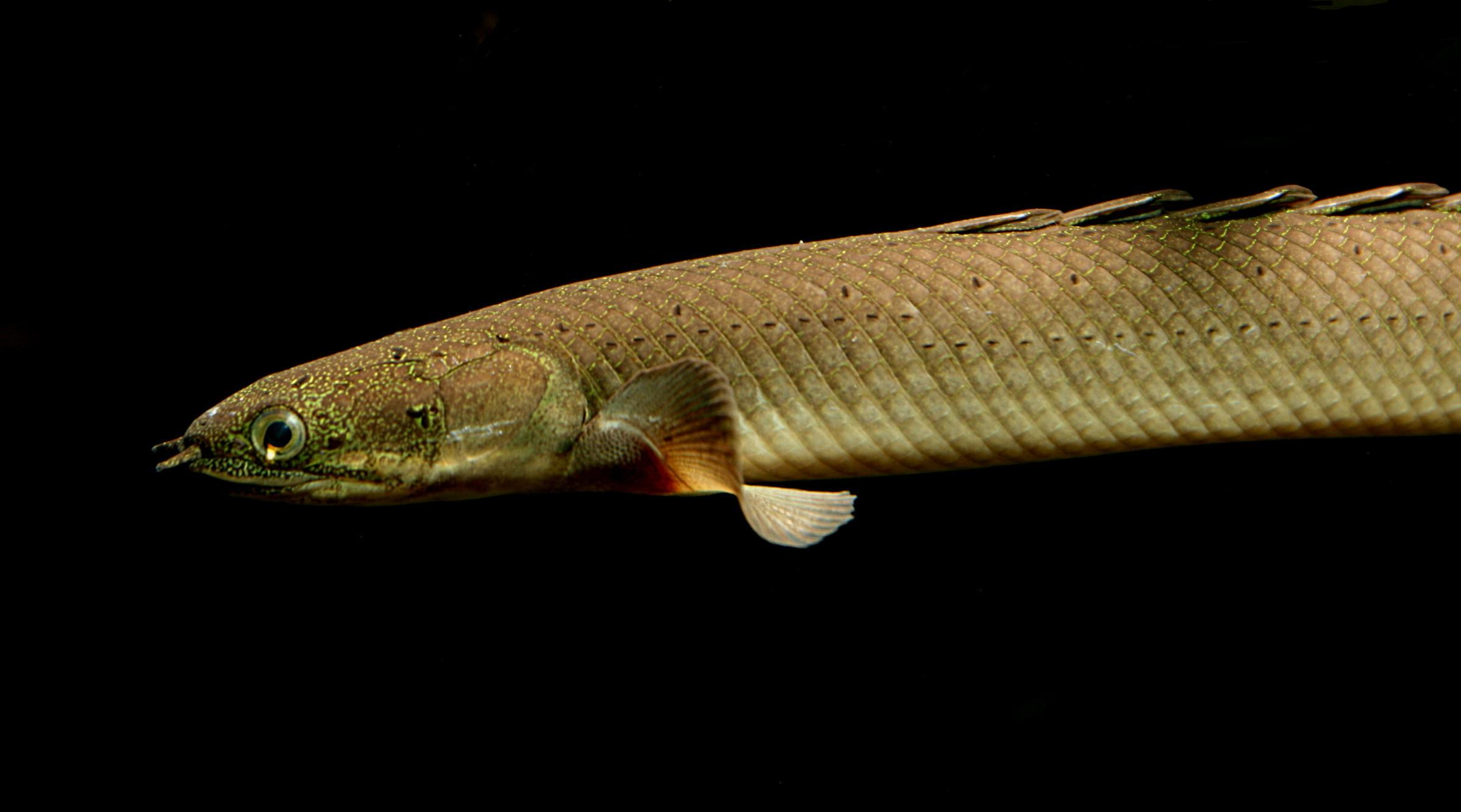 Polyterus senegalus